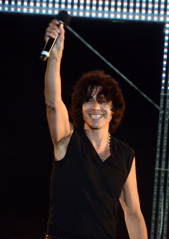 Jean-Luc Lahaye au concert "La Folie des années 80" à Enghien-les-Bains